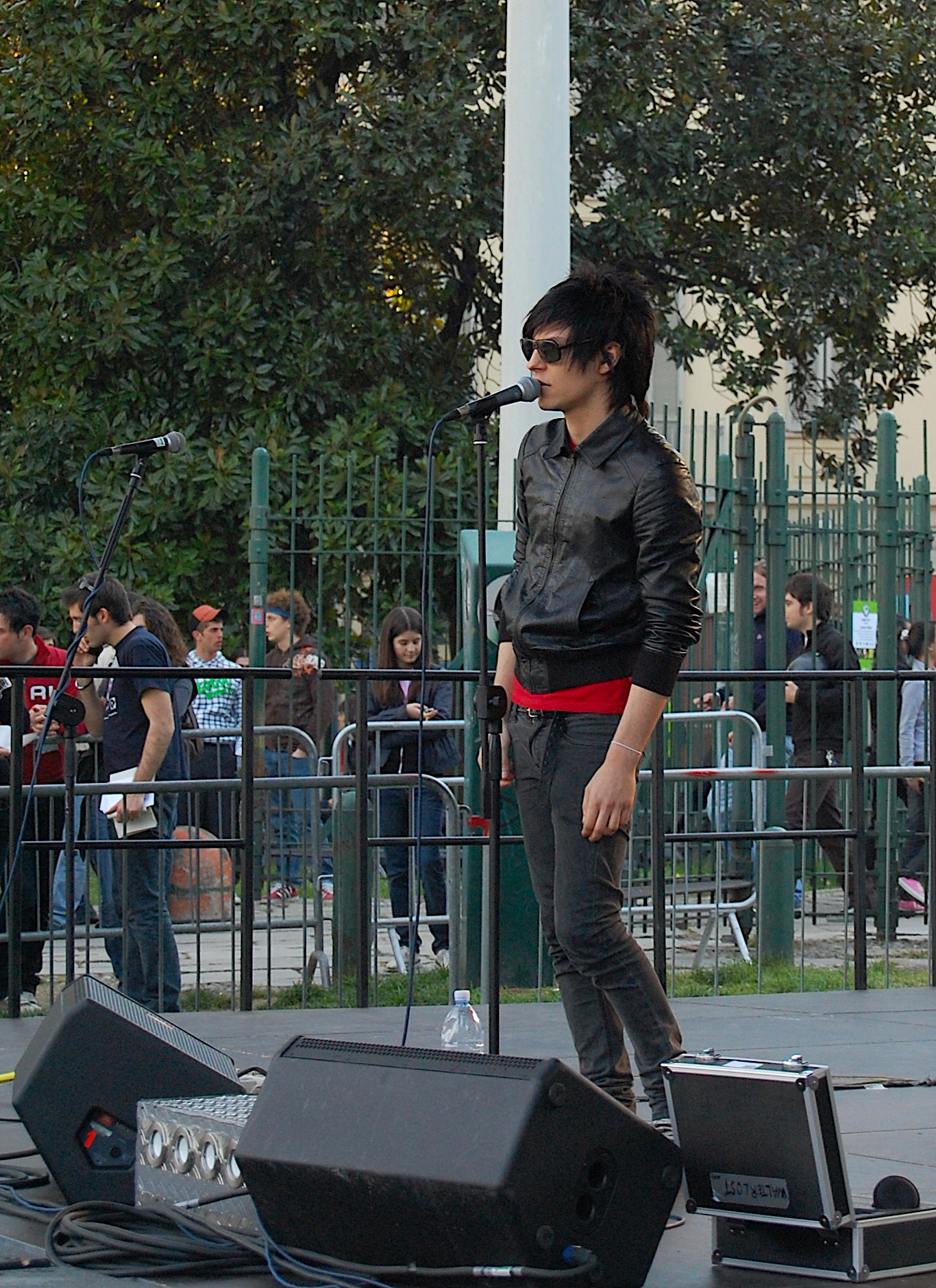 Walter, cantante dei LOST durante il soundcheck del concerto al Parco delle Basiliche di Milano